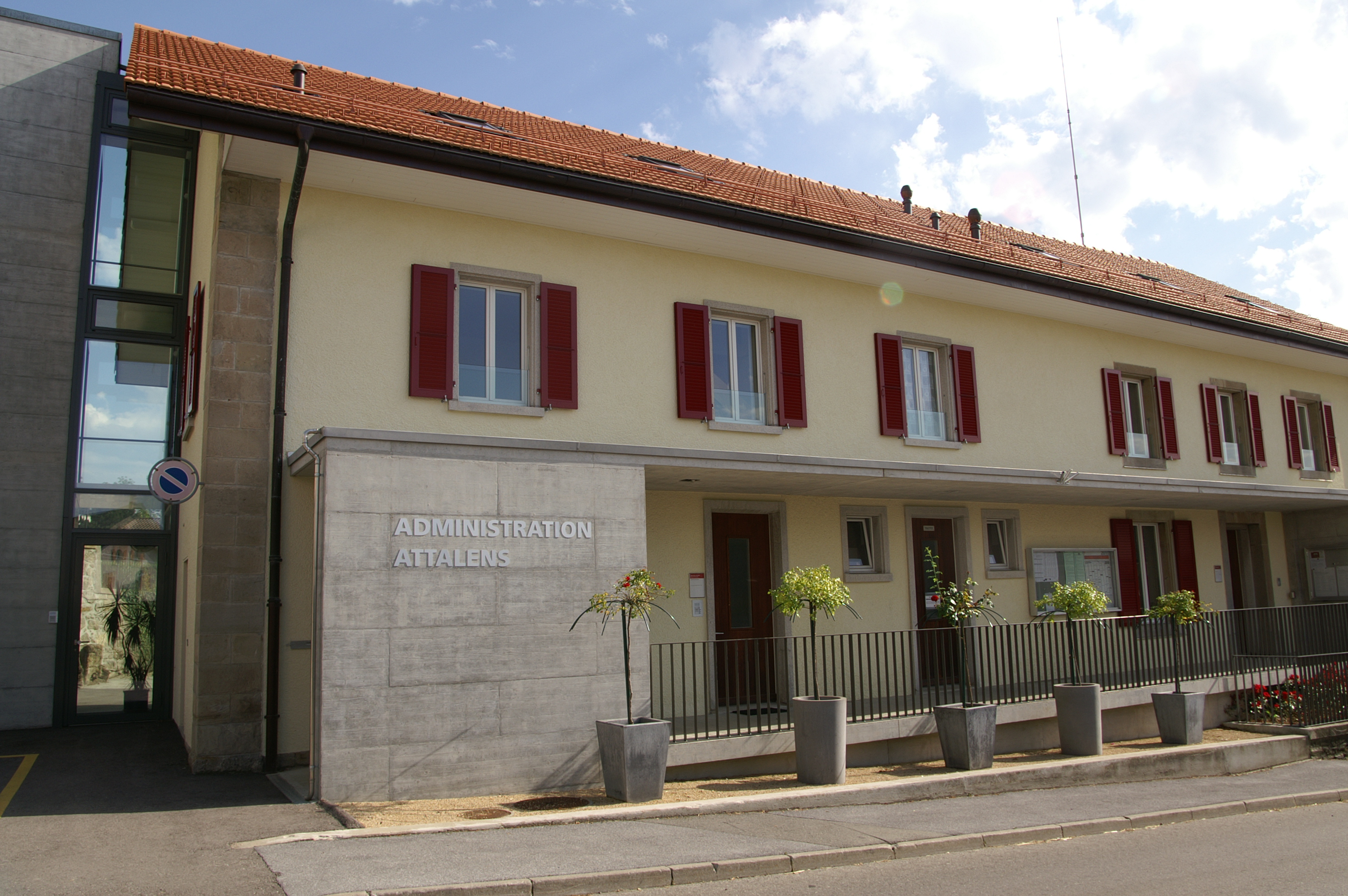 Administration communale d'Attalens.